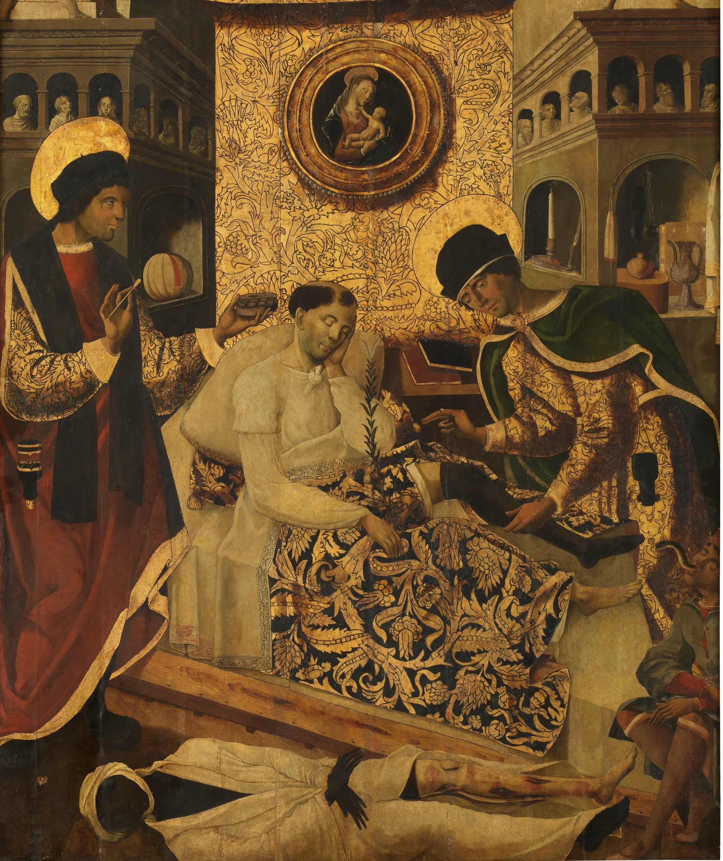 El lienzo representa un milagro realizado por los santos mártires cristianos Cosme y Damián.